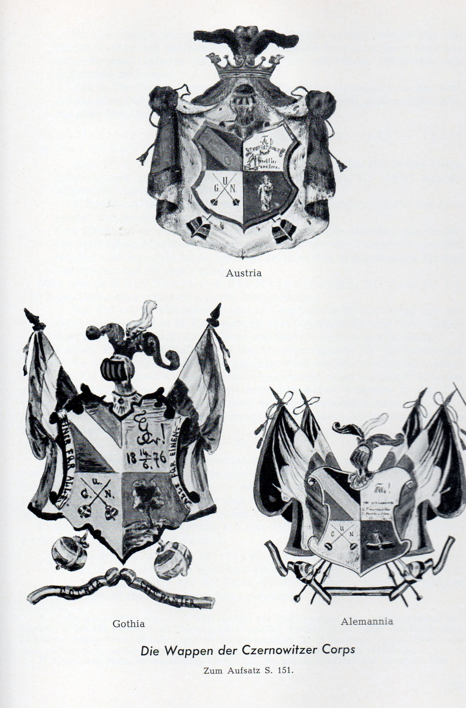 Studentenwappen der Czernowitzer Corps Austria, Gothia und Alemannia